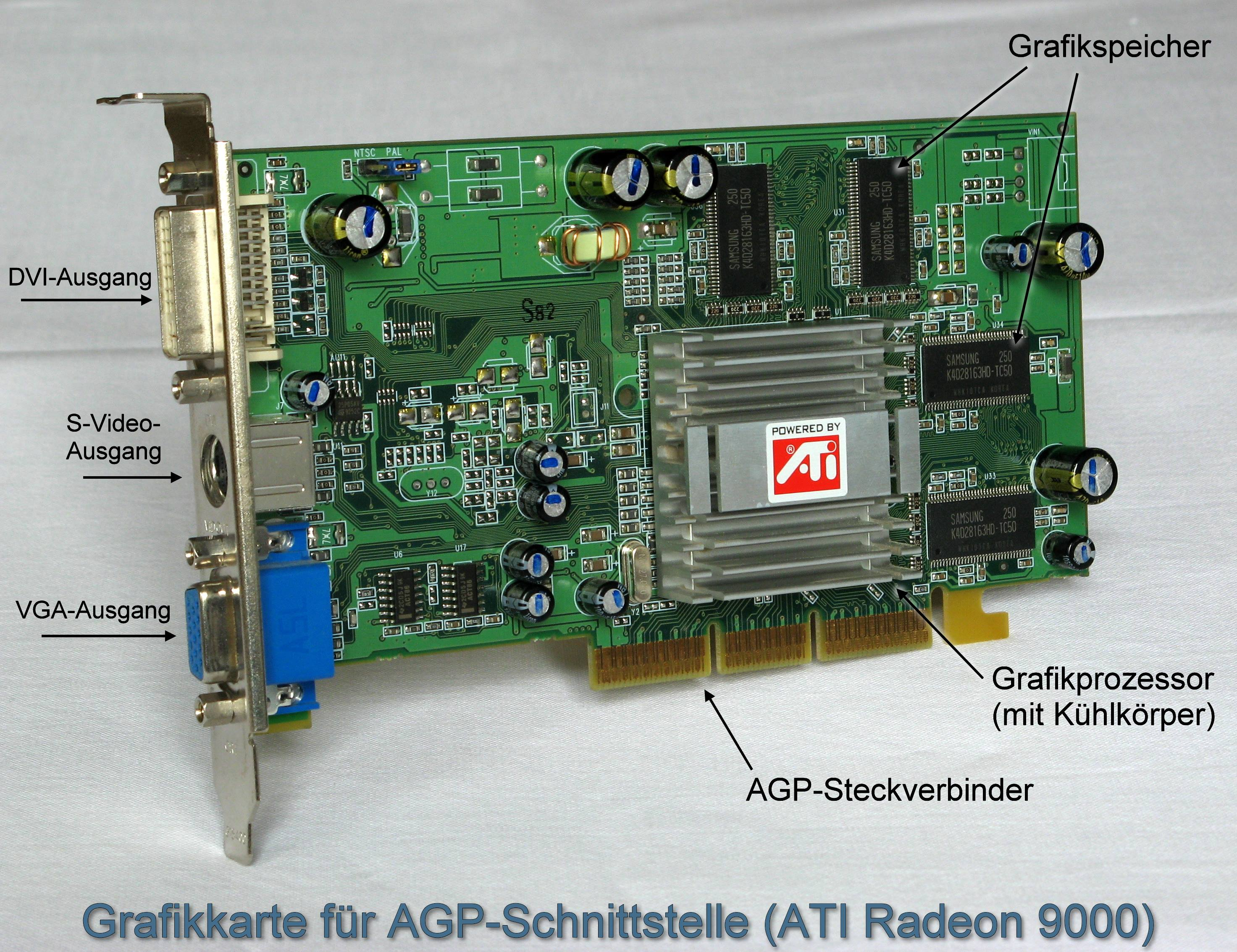 Grafikkarte (ATi Radeon 9000) beschriftet